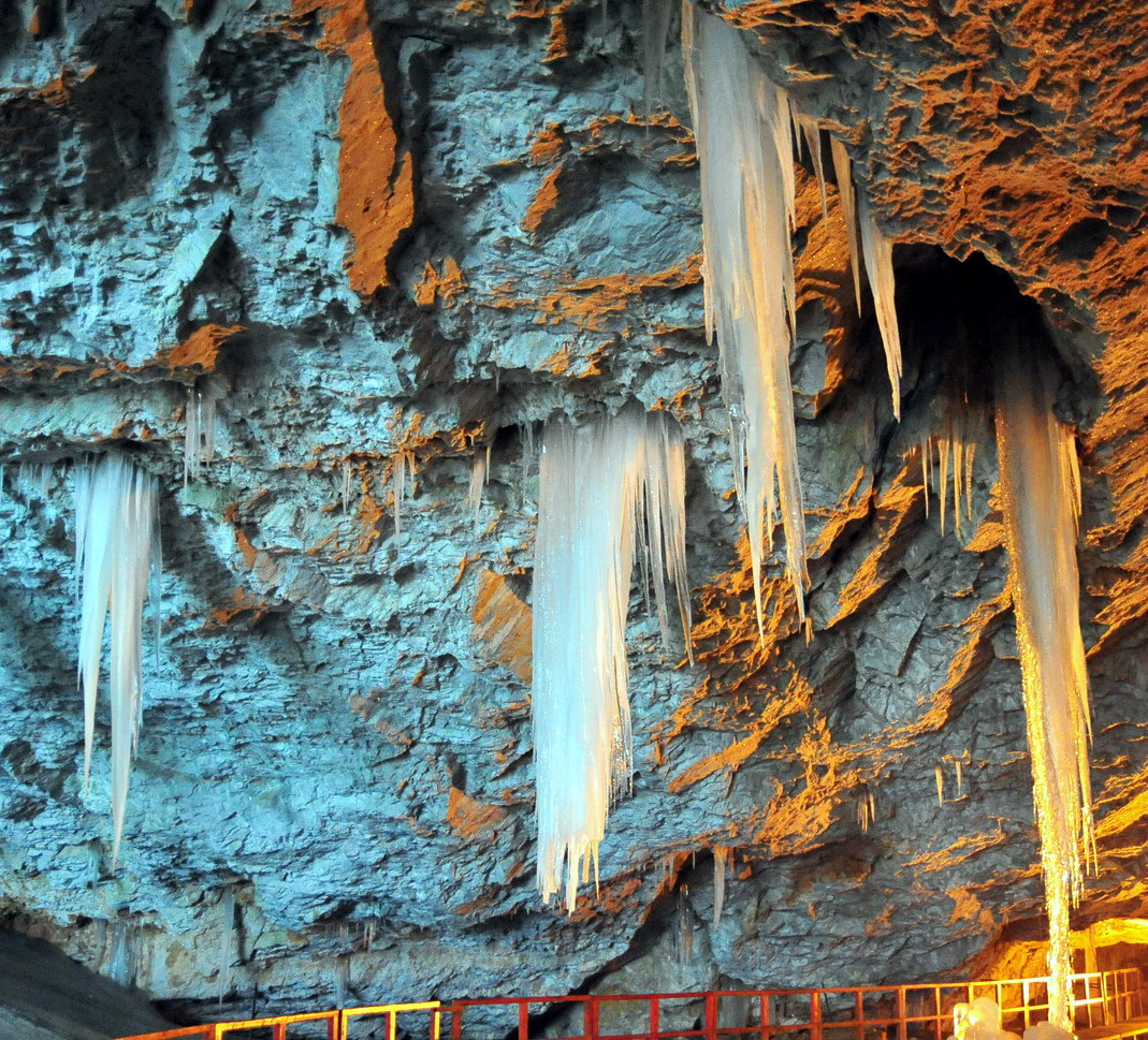 Stalactite de gheaţă în peştera Scărişoara